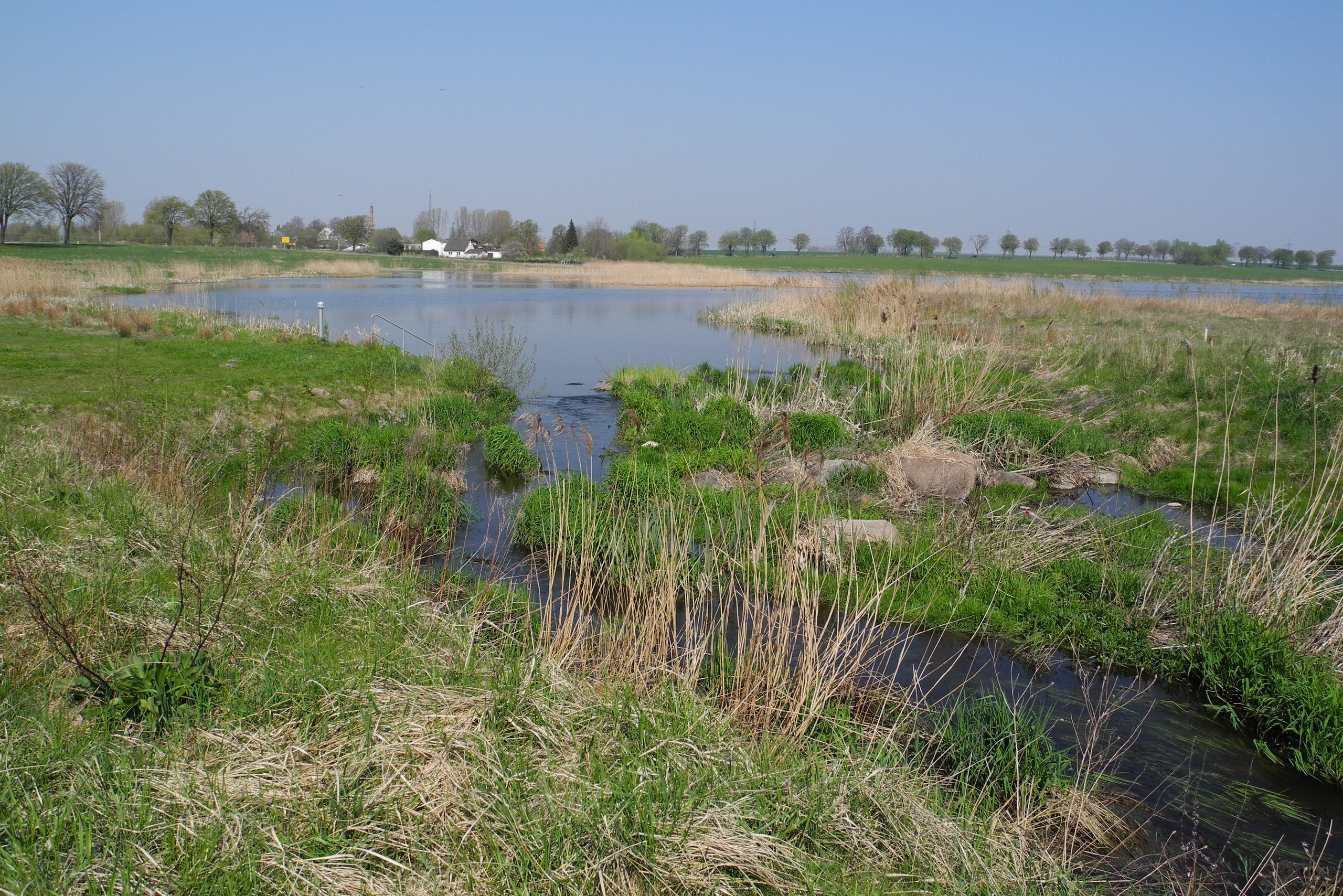 Richtenberger See - Lake of Richtenberg - Ablauf des Sees (Blinde Trebel)